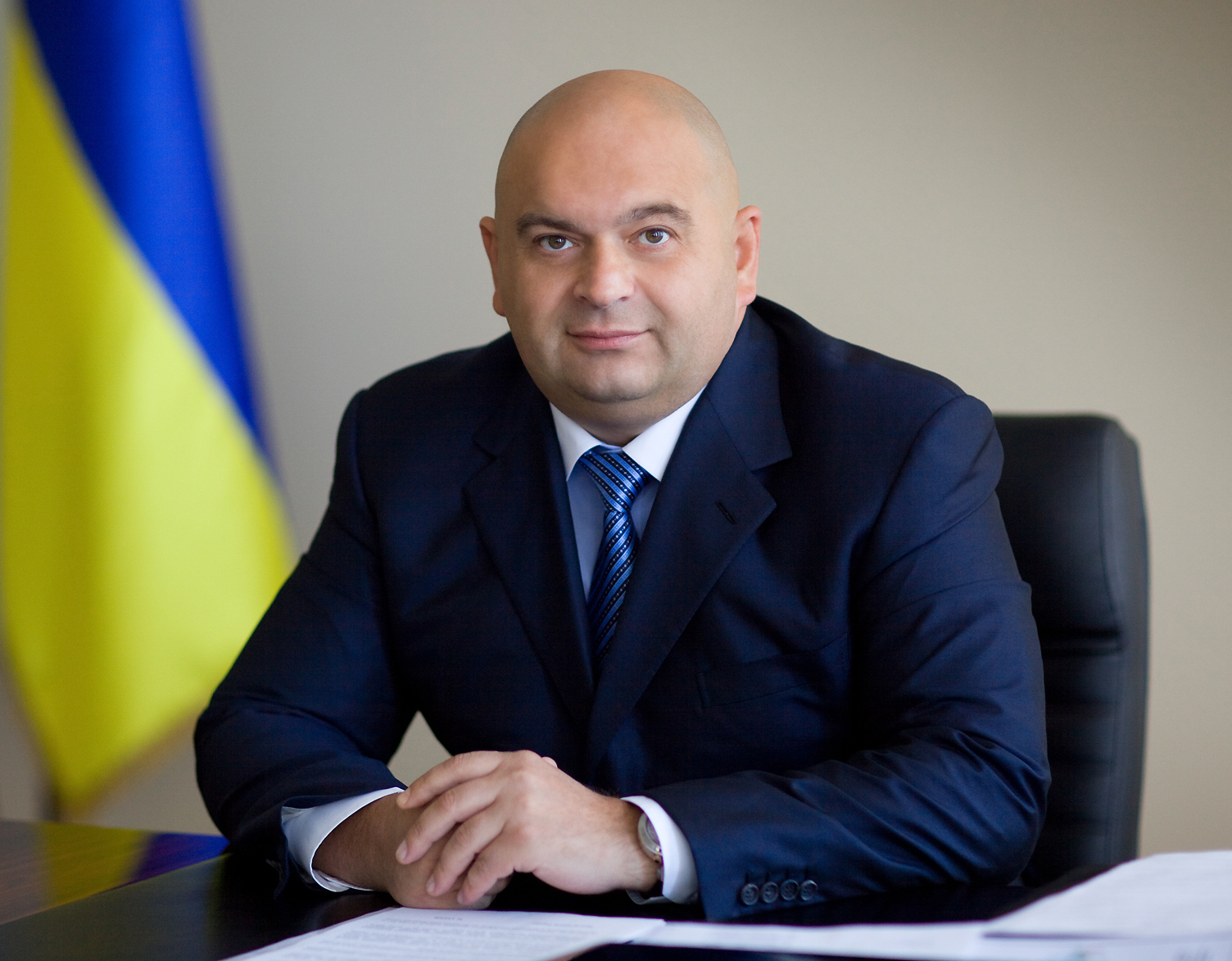 Злочевский Николай Владиславович